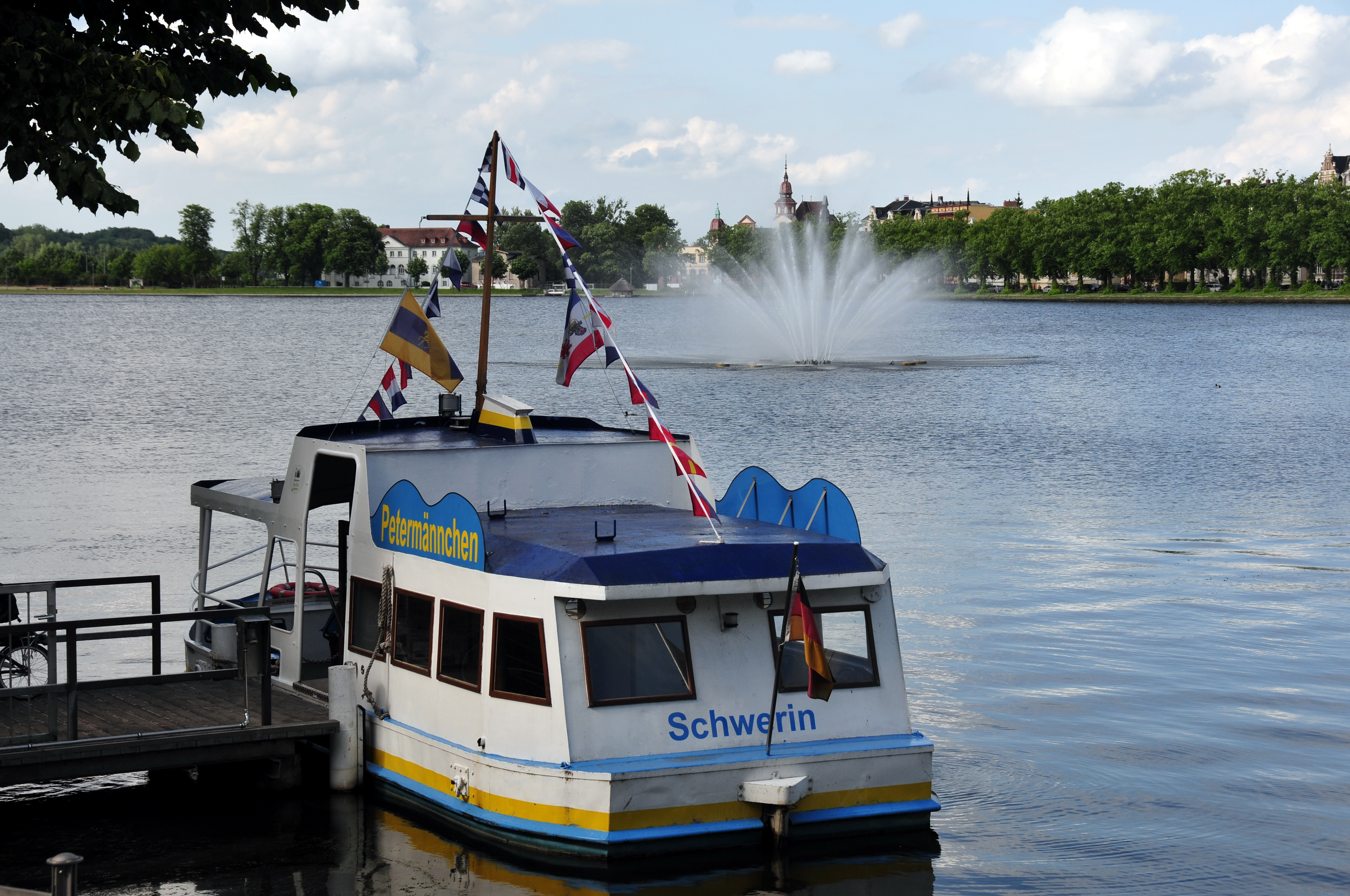 Schwerin; mit 50mm Brennweite von der Orangerie zum Bahnhof